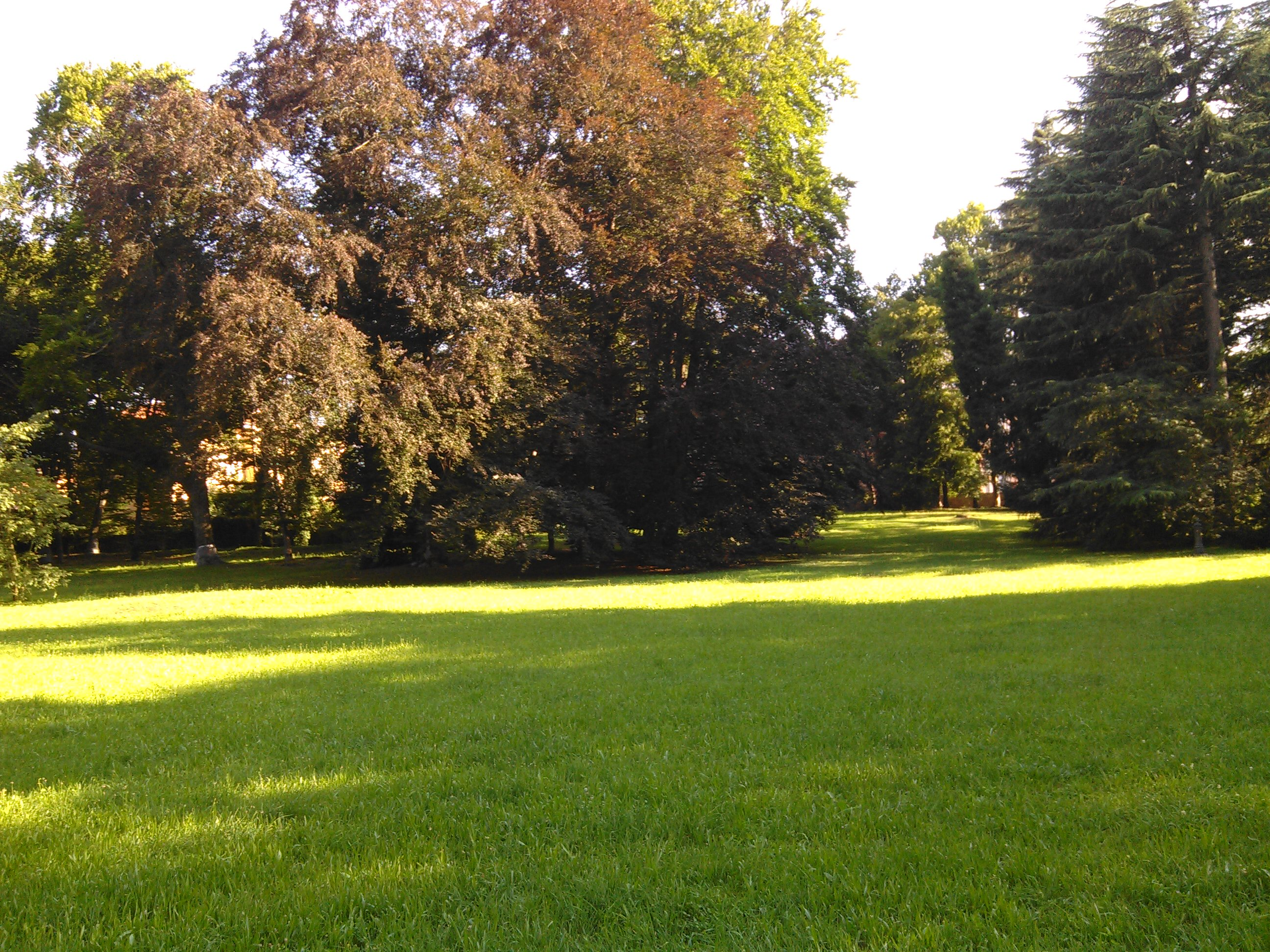 Immagine scattata nel Parco Ex-ILA di Legnano (MI)